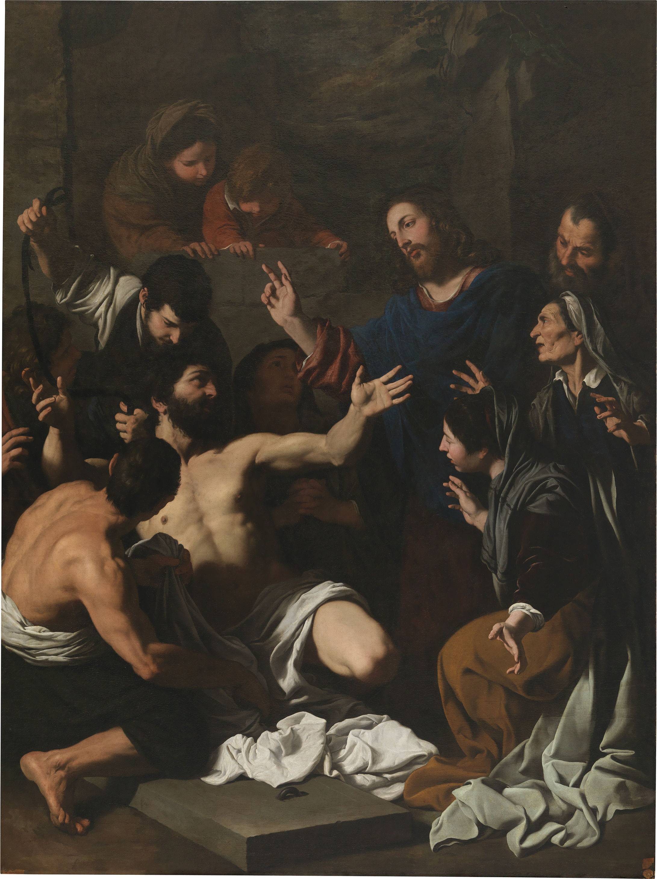 La obra representa a Jesucristo resucitando a Lázaro de Betania de entre los muertos.